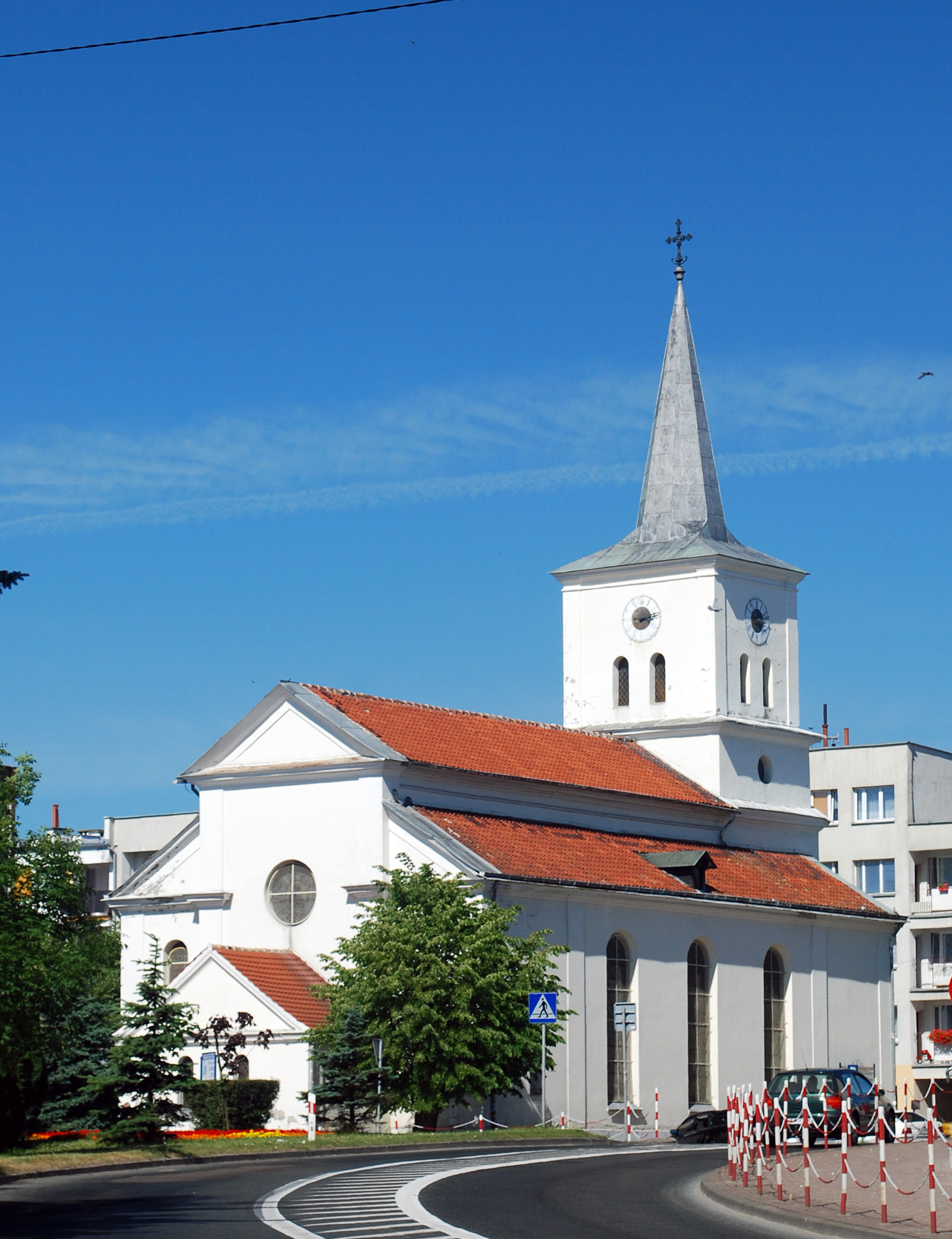 Sztum - dawny kościół ewangelicki, obecnie rzymskokatolicki filialny p.w. Matki Boskiej Wspomożenia Wiernych, 1816-1818 You can see all photographs in category Wikiekspedycja 2010. The making of this document was supported by Wikimedia Polska.